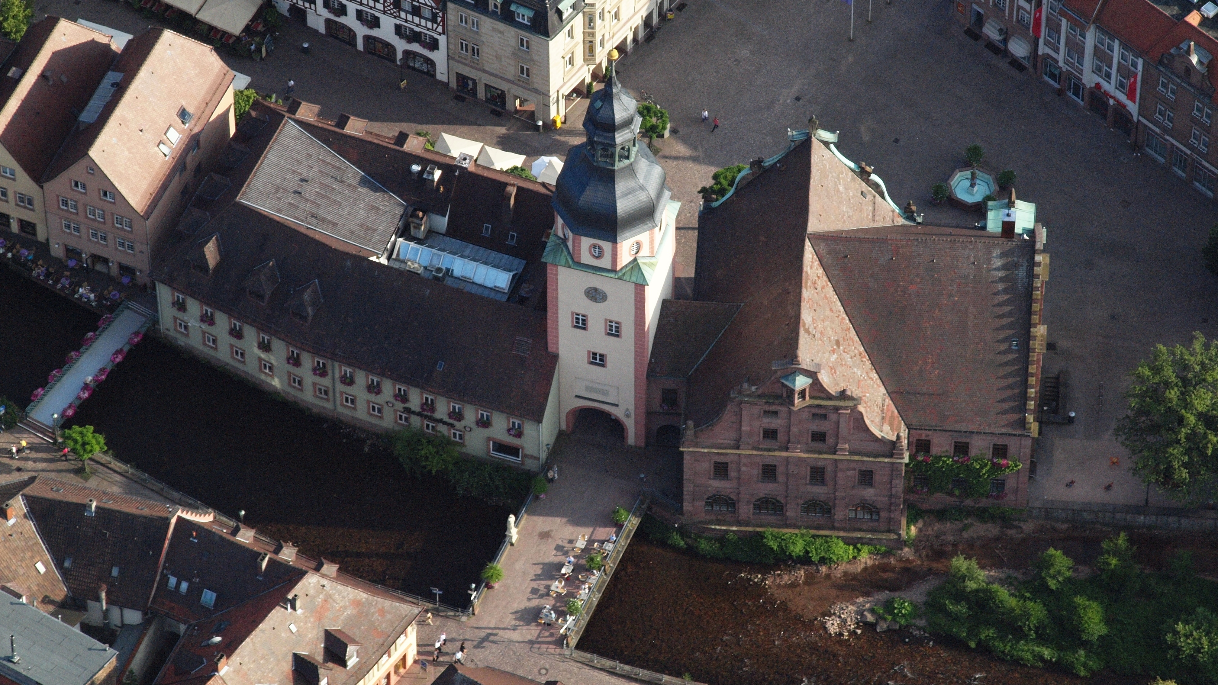 Rathaus in Ettlingen: Luftaufnahme